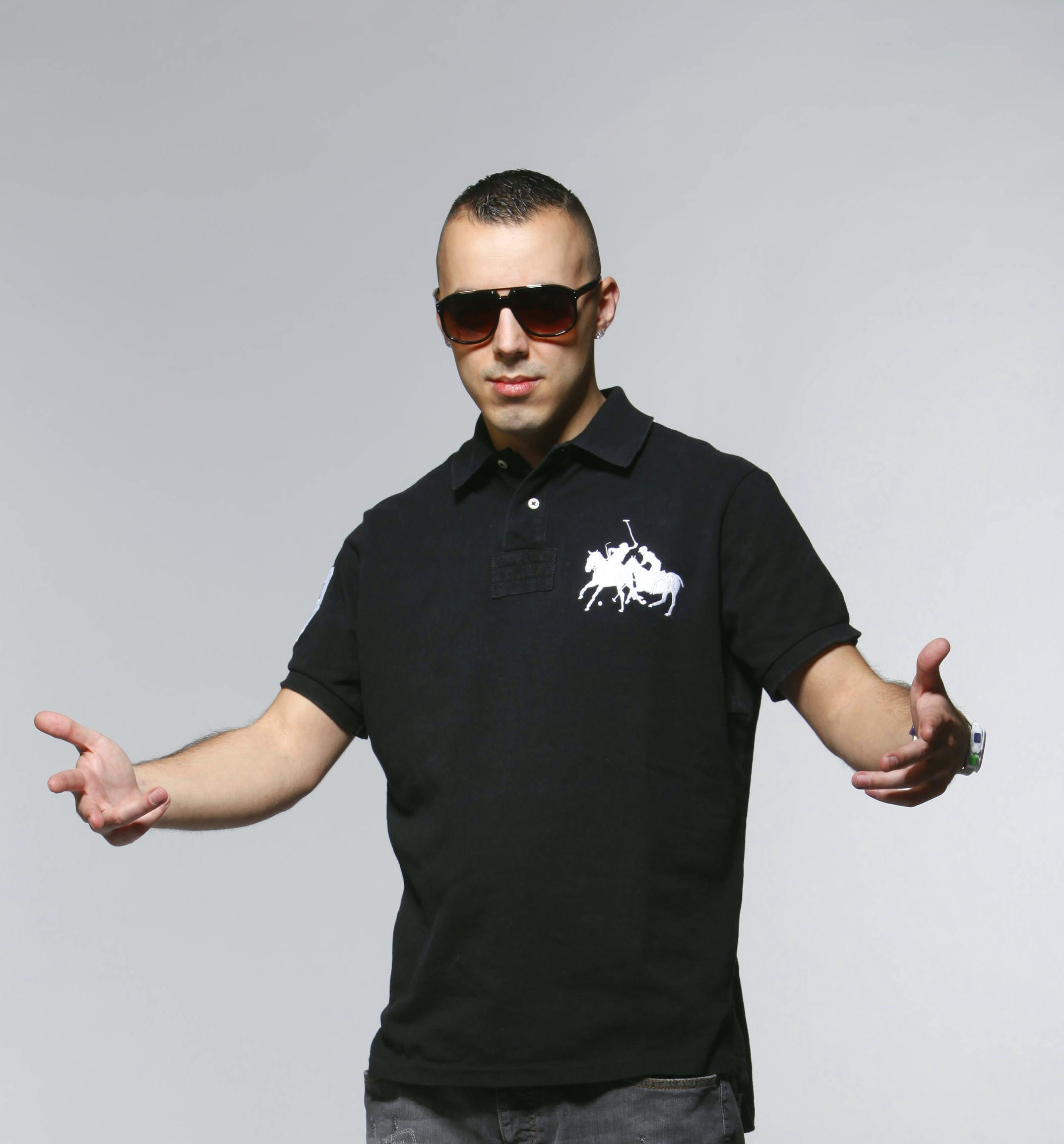 Photo Lucenzo pour page wikipédia